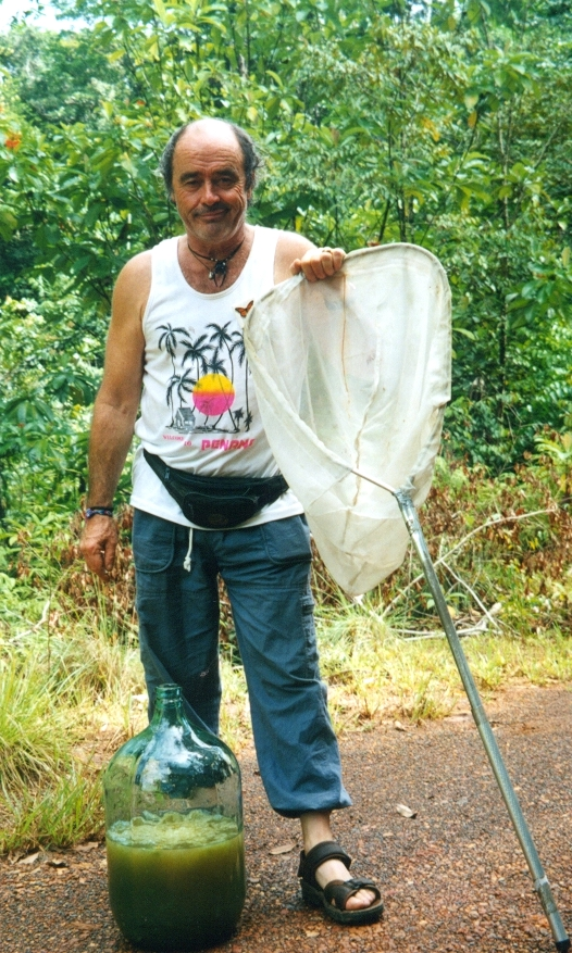 Georges Brossard au Venezuela (Las Claritas), pour le tournage de la série Insectia, 1998. Georges Brossard, né en 1940 à La Prairie au Québec (Canada),fils de Georges-Henri Brossard, fondateur de la ville de Brossard , est un entomologiste et fondateur de l'Insectarium de Montréal.